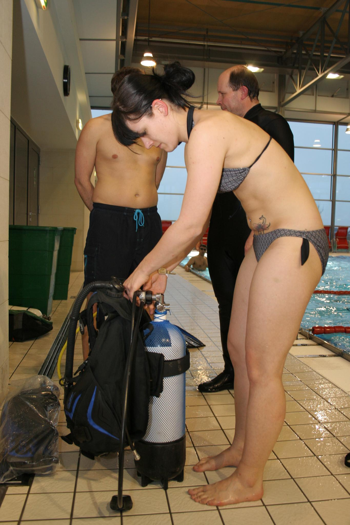 Frau beim Anprobieren der Tauchausrüstung.